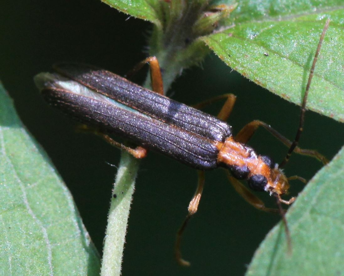 Scheinbockkäfer Nacerdes carniolica (tot) am 17.8.2016 im Pfälzerwald (Saupferch, unterhalb des Drachenfelsen)